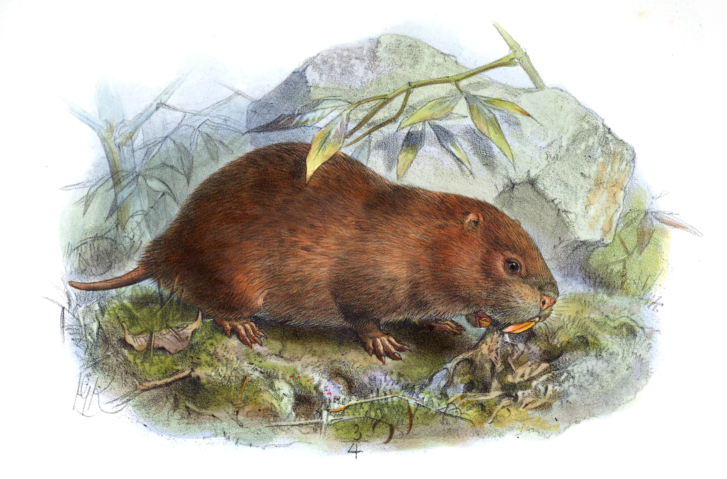 Rhizomys badius = Cannomys badius